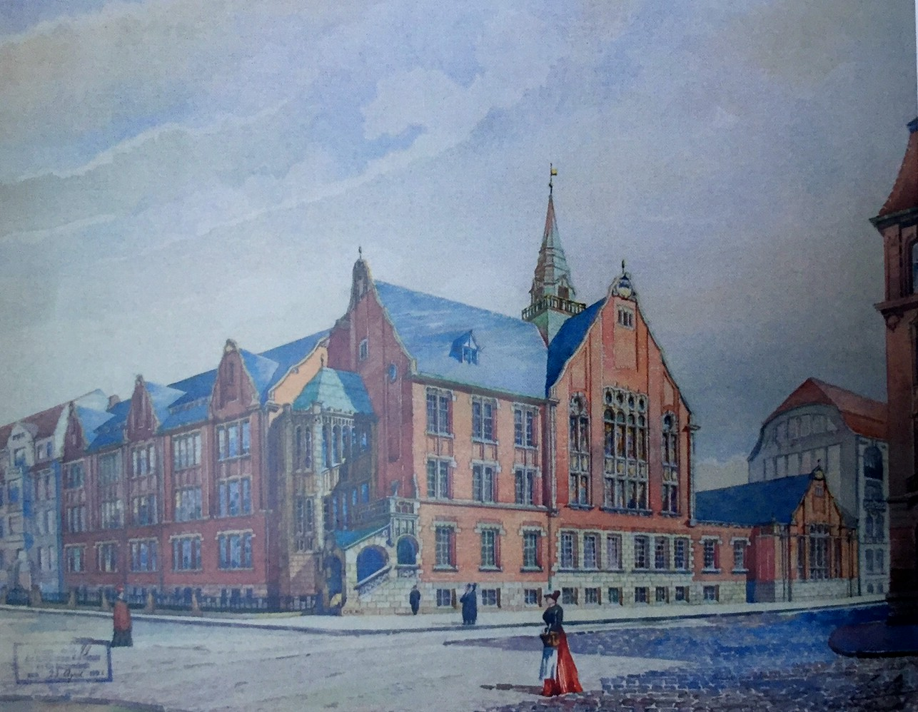 Aquarell von Erbe als Studie zum Bau der Staatlichen Mädchenschule am Lerchenfeld (1908-1910)